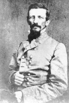 Alexander Peter Stewart (1821–1908), generał Armii Stanów Skonfederowanych, zdjęcie z okresu wojny secesyjnej, North Carolina State Archives